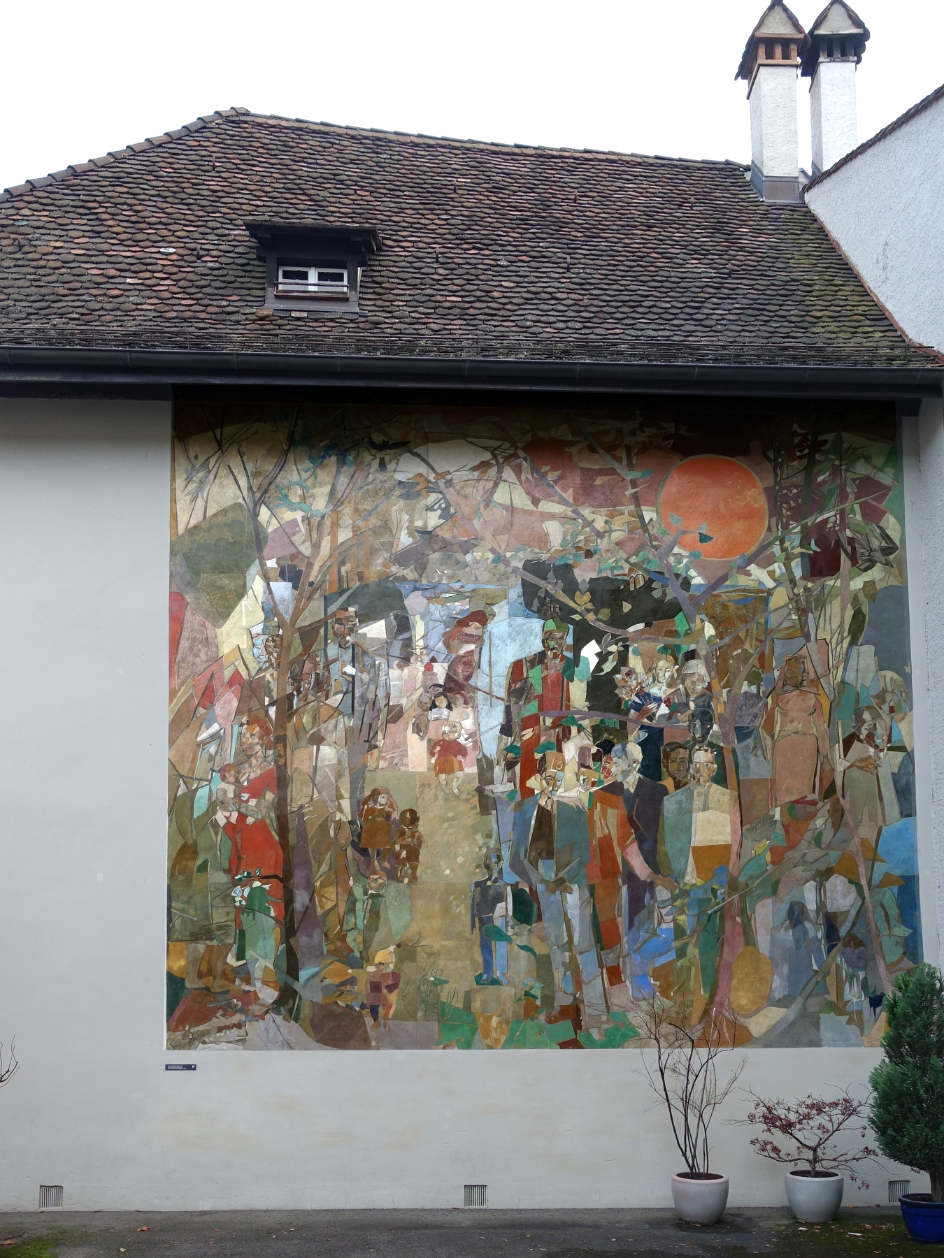 Kunstkredit Basel-Stadt. 1. Preis für das Fassadenbild, Rückwand des Sigristenhauses im Hof des Humanistischen Gymnasiums, Basel. 1946–1953, Le Chant de l’Occident von Ernst Stocker, Coghuf (1905–1976)